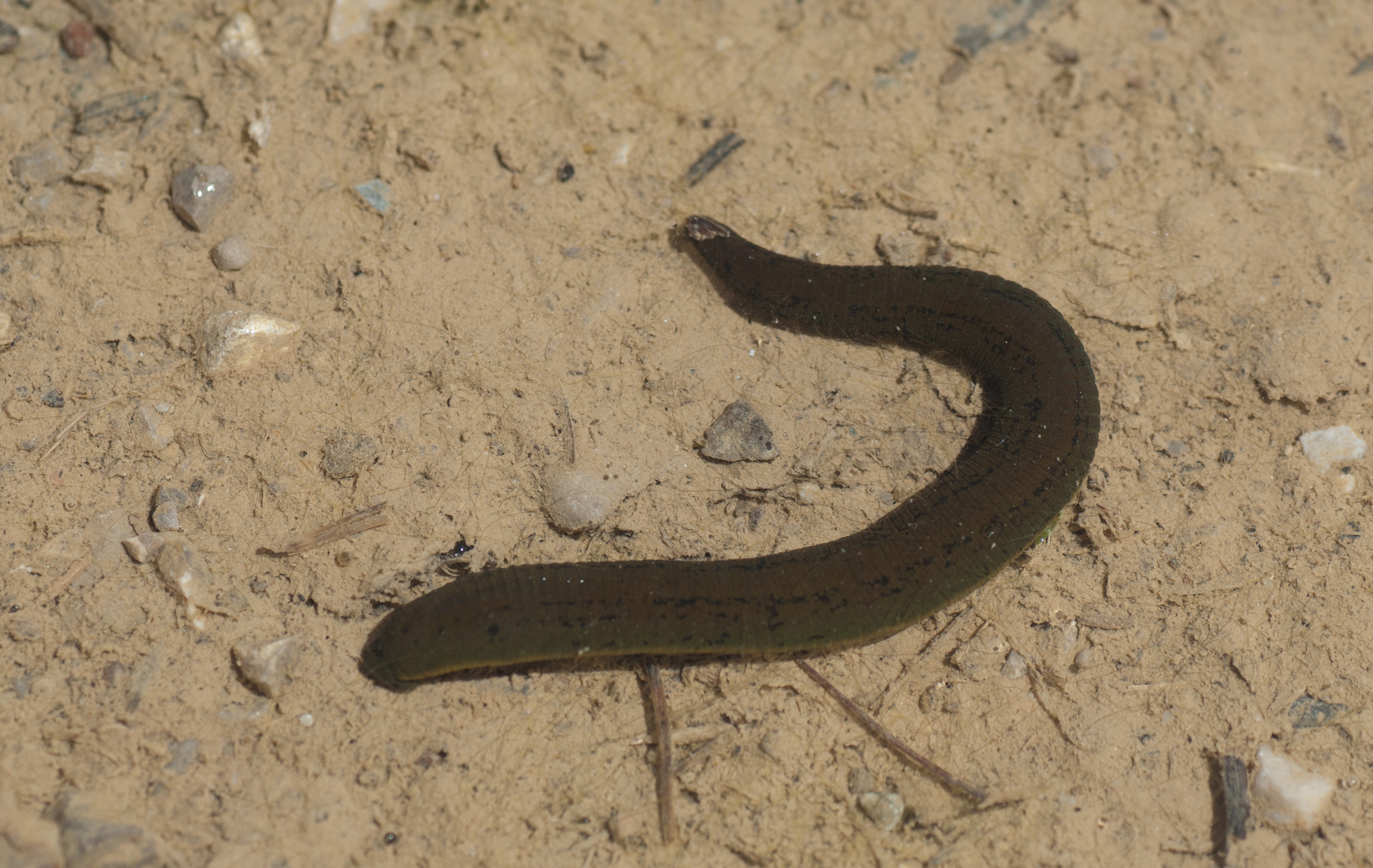 Pferdeegel, fotografiert in einer Pfütze unweit eines Tümpels auf der Walder Alm im Karwendel auf 1.500 Meter Seehöhe